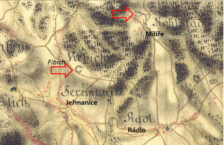 Opevnění budovaná v letech 1778-1779 u Milířů (Rádlo)